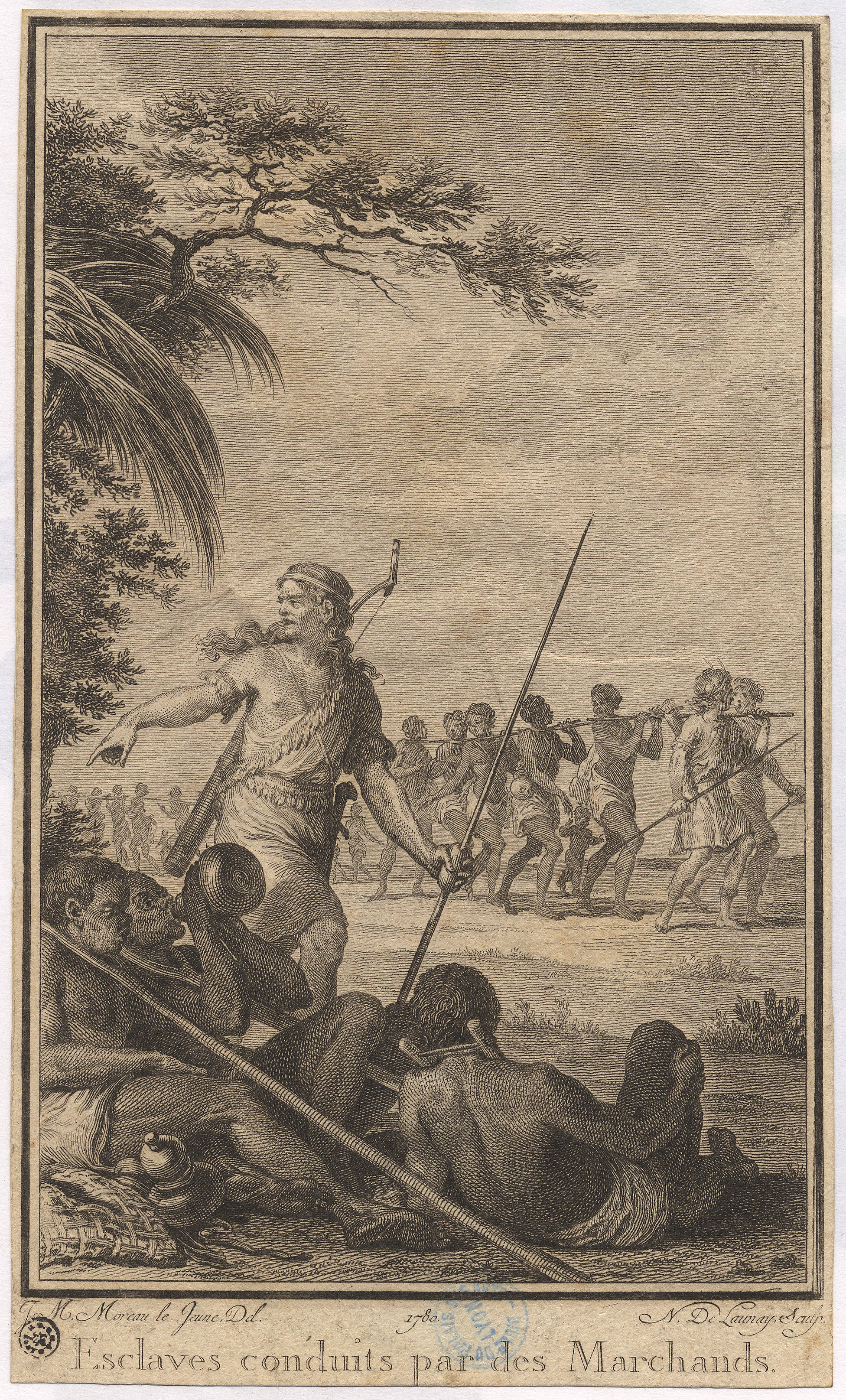 Estampe tirée de : Guillaume-Thomas Raynal, "Histoire philosophique et politique des établissements et du commerce des Européens dans les deux Indes", Tome troisième, Genève, 1780. L'estampe est signée par Jean-Michel Moreau (dit Moreau le Jeune), dessinateur & Nicolas Delaunay, graveur. N° inventaire : 75.6721, Musée du Quai branly, Paris.